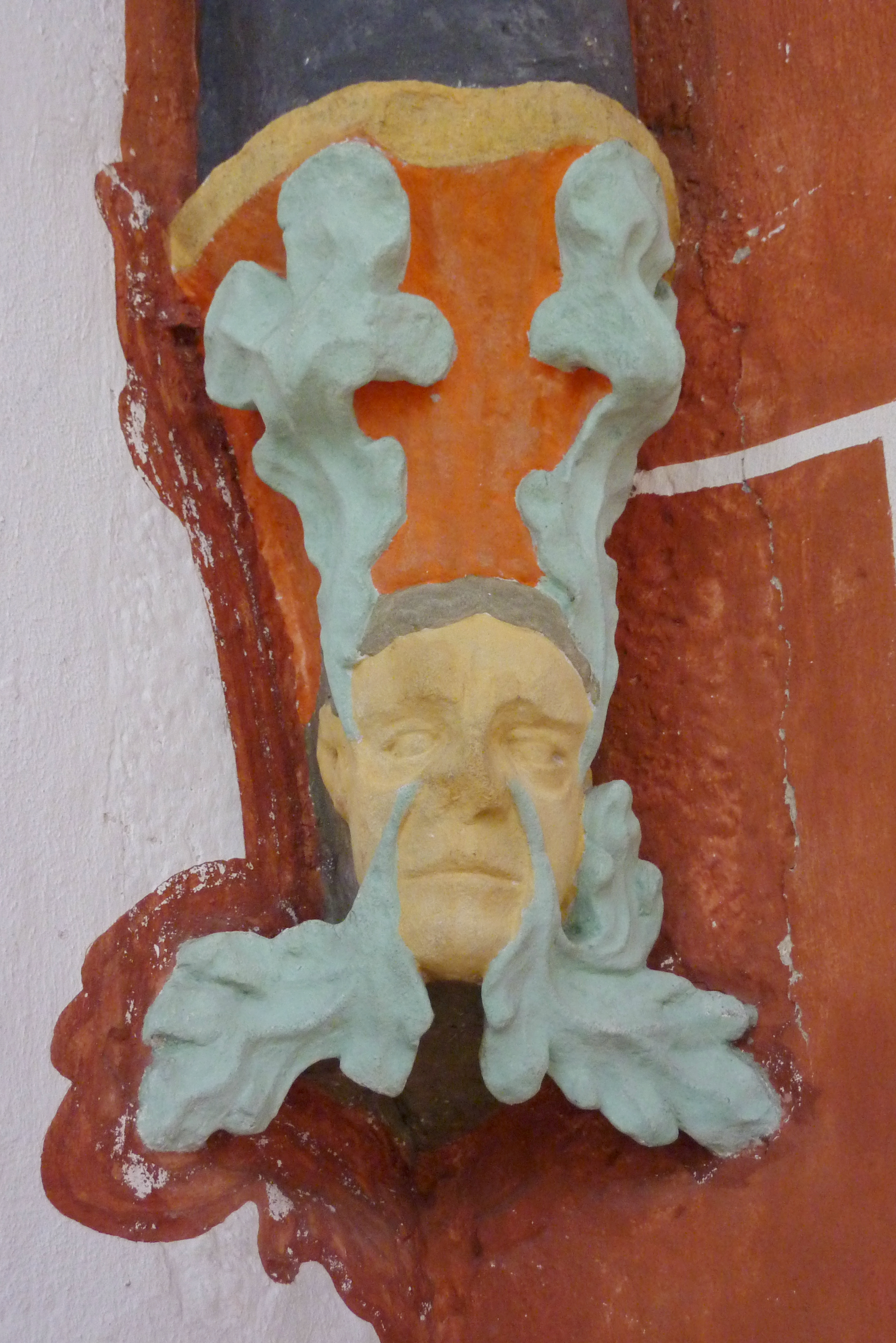 Evangelische Walpurgiskirche in Alsfeld im Vogelsbergkreis (Hessen), Konsole im Chor, Darstellung: Kopf mit Laubwerk